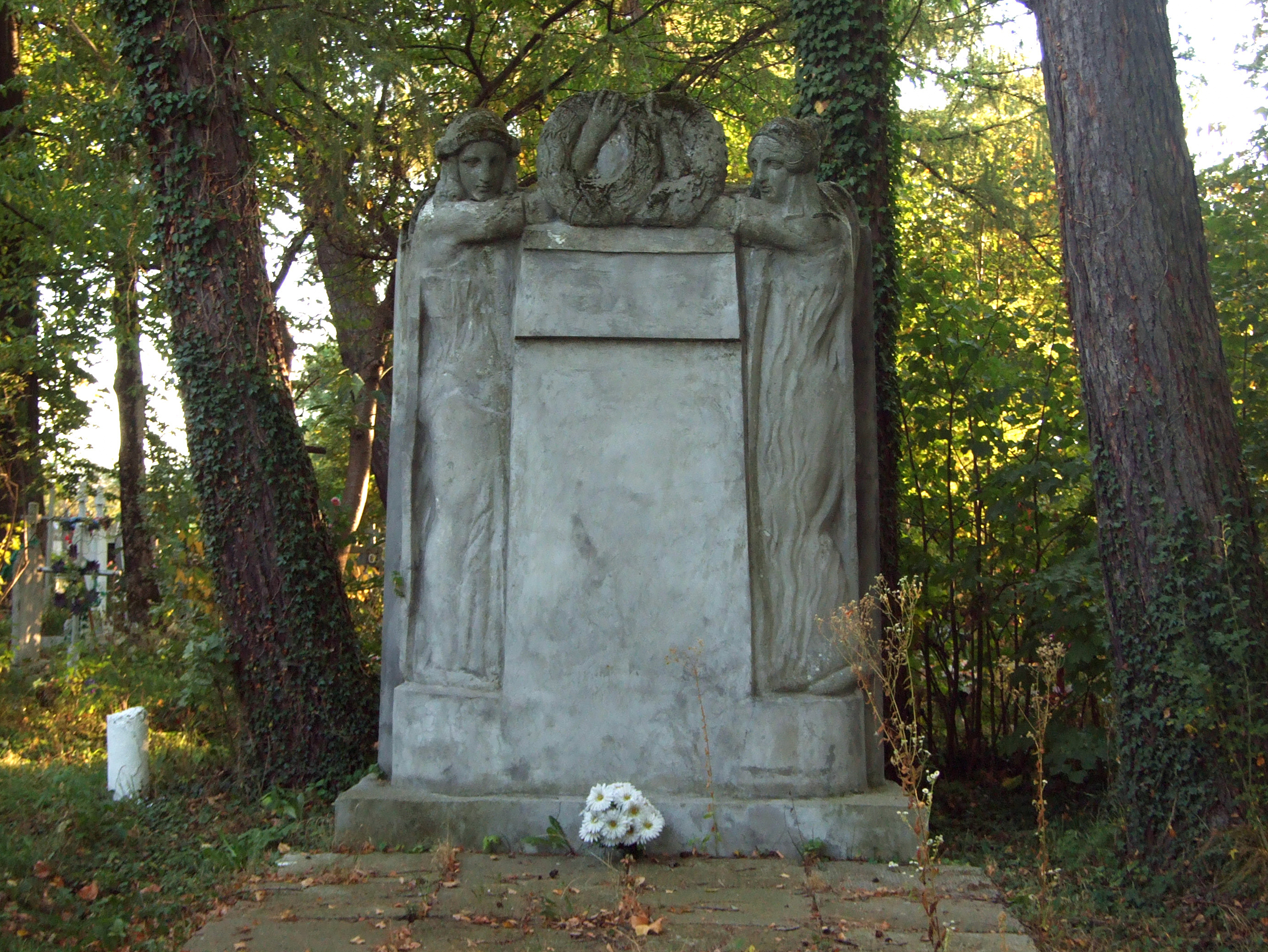 Ділянка могил вояків, полеглих в І світовій війні, Болехів, Волоське кладовище. Меморіал, 1917 р.